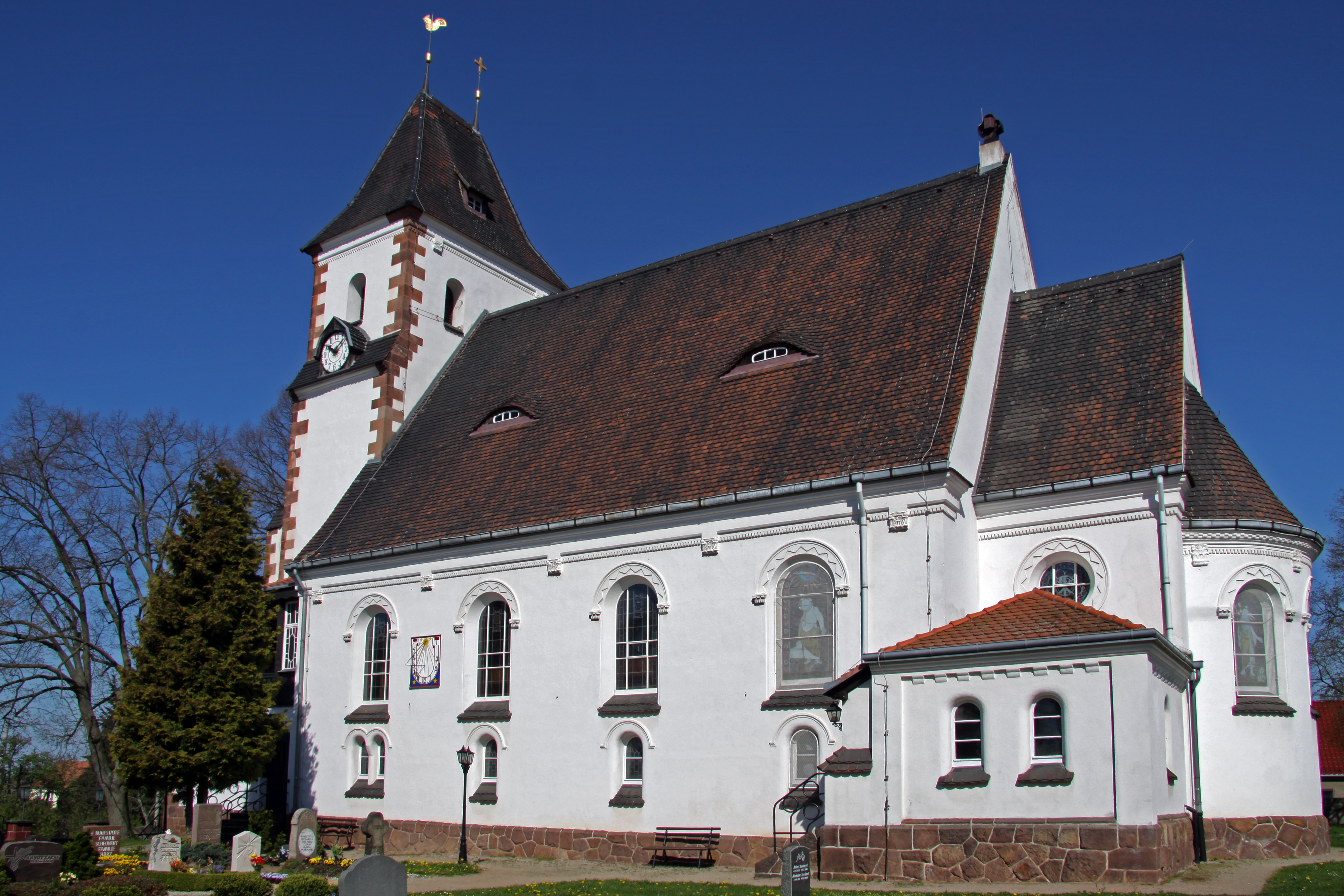 Großweitzschen, Kirche St. Martin